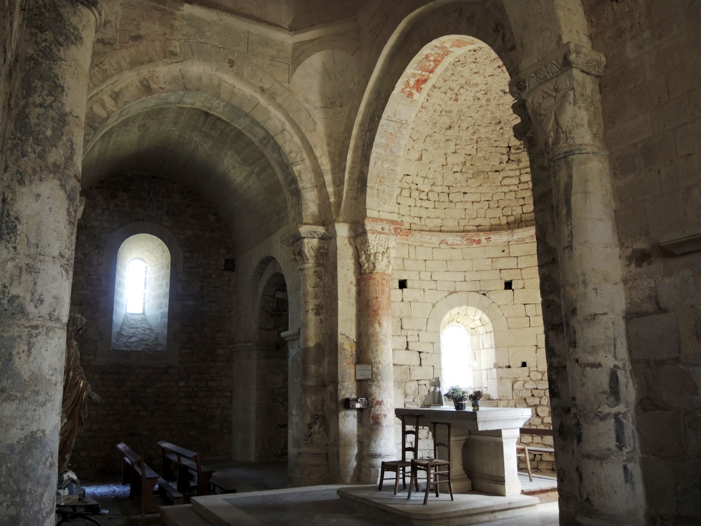 Veyrines St-Symphorien de Mahun choeur et abside